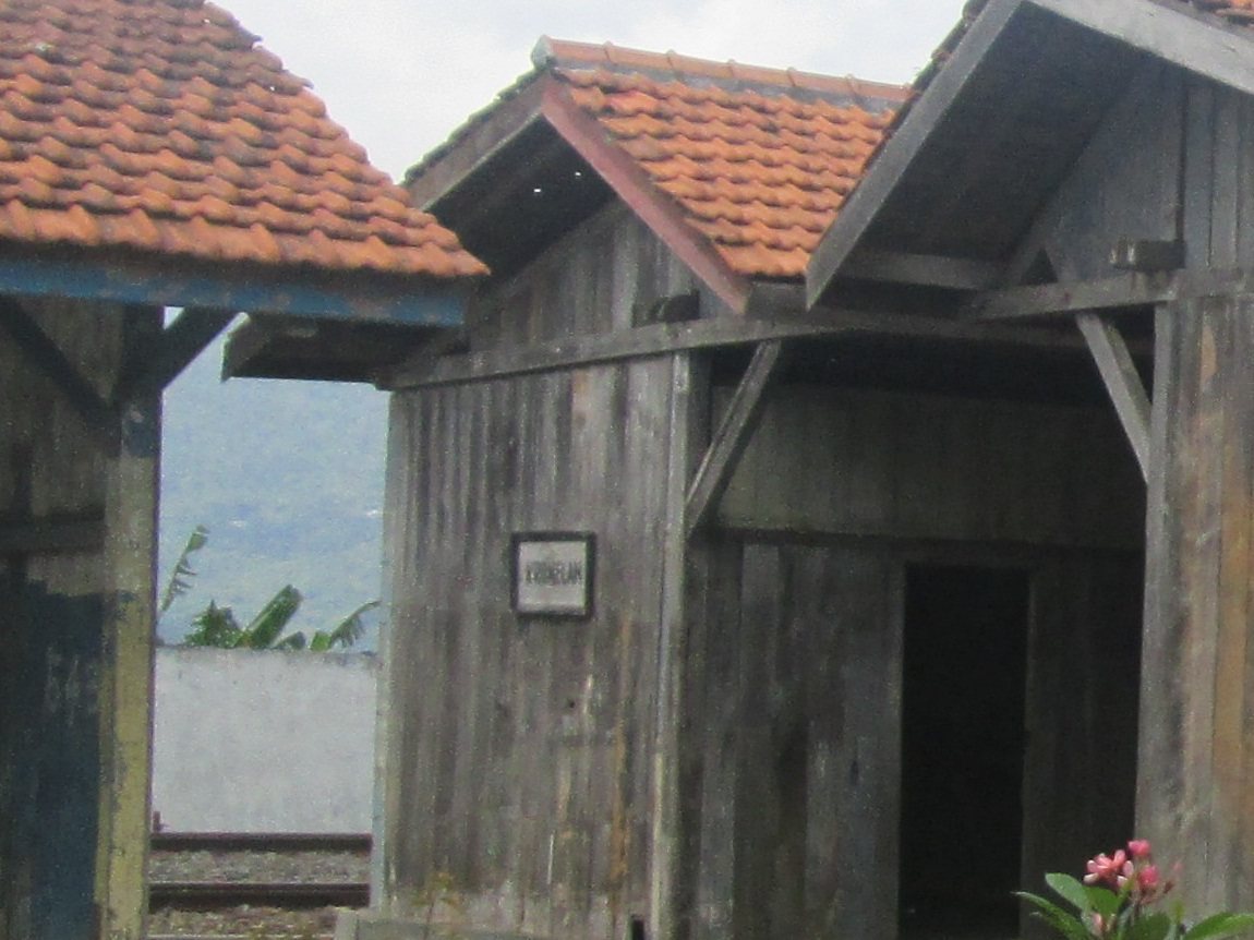 Halte Kronelan yang sudah dijadikan pajangan di Museum Kereta Api Ambarawa, 2016. Halte dipajang di samping Halte Tekaran dan di belakang agak pojok Halte Cikoya.